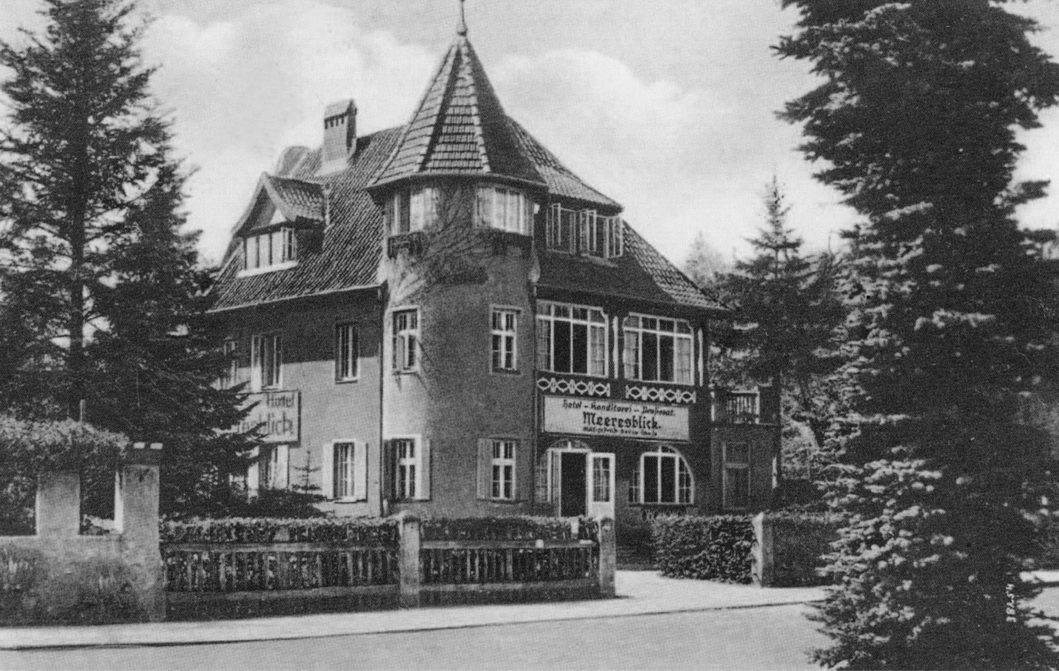 Открытка виллы «Вид на море» (почтовый штемпель 20.12.1940). Опубликована в книгах Светлогорск. Янтарный курорт России. / Авт.-сост. В. И. Воронов. Вильнюс: Standartu Spaustuve, 2011. — ISBN 978-9555-488-53-8 Invalid ISBN и Путешествие по Балтийскому побережью Замланда / Авт.-сост. В. И. Воронов; пер. с нем. Е. Мингалевой. — Калининград, 2009. — ISBN 978-9955-488-37-8. С. 83-85.